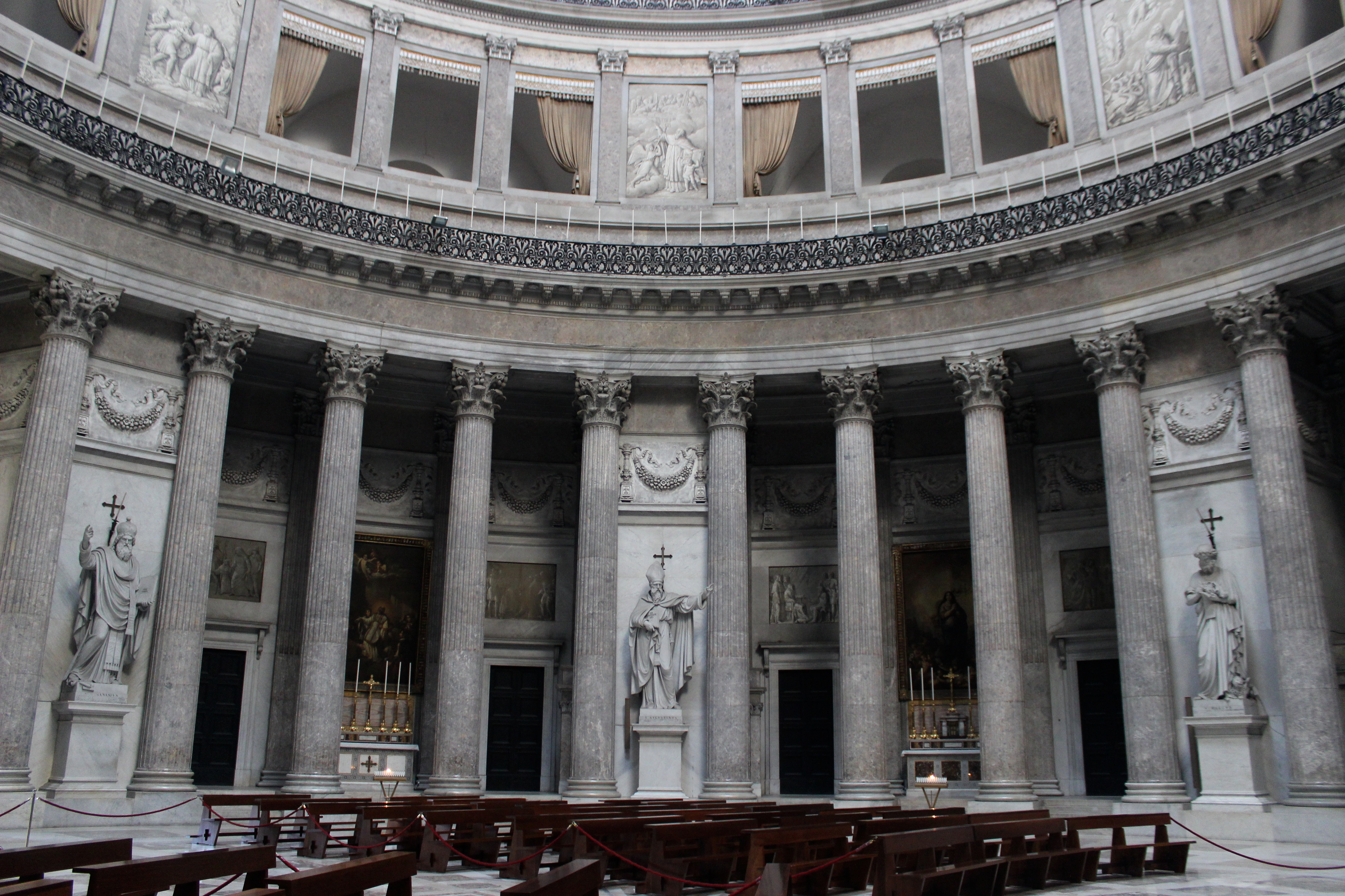 Nápoles. San Francesco di Paola. Interior.